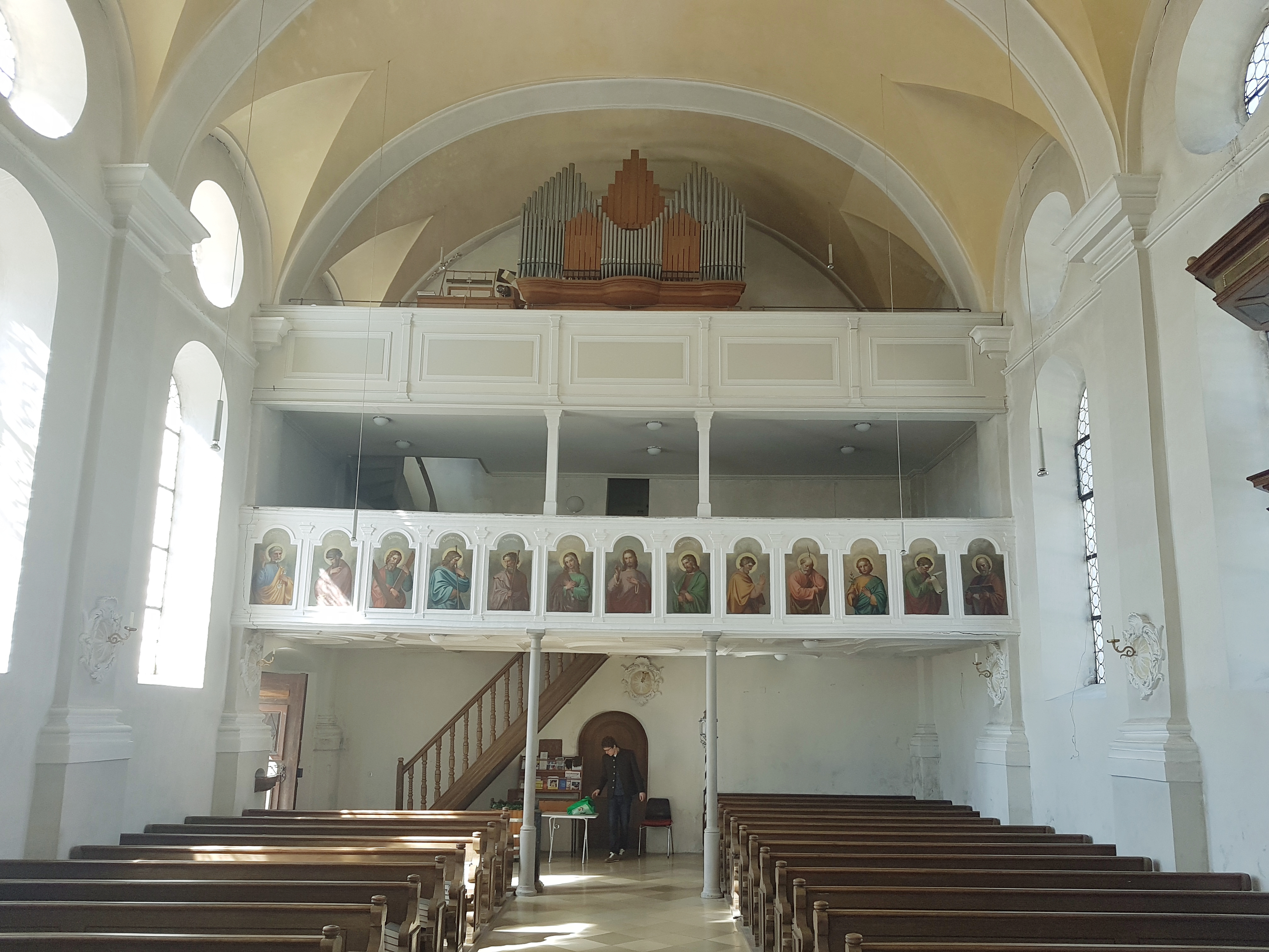 St. Georg (Pöring), Innenraum mit Blick zur Empore